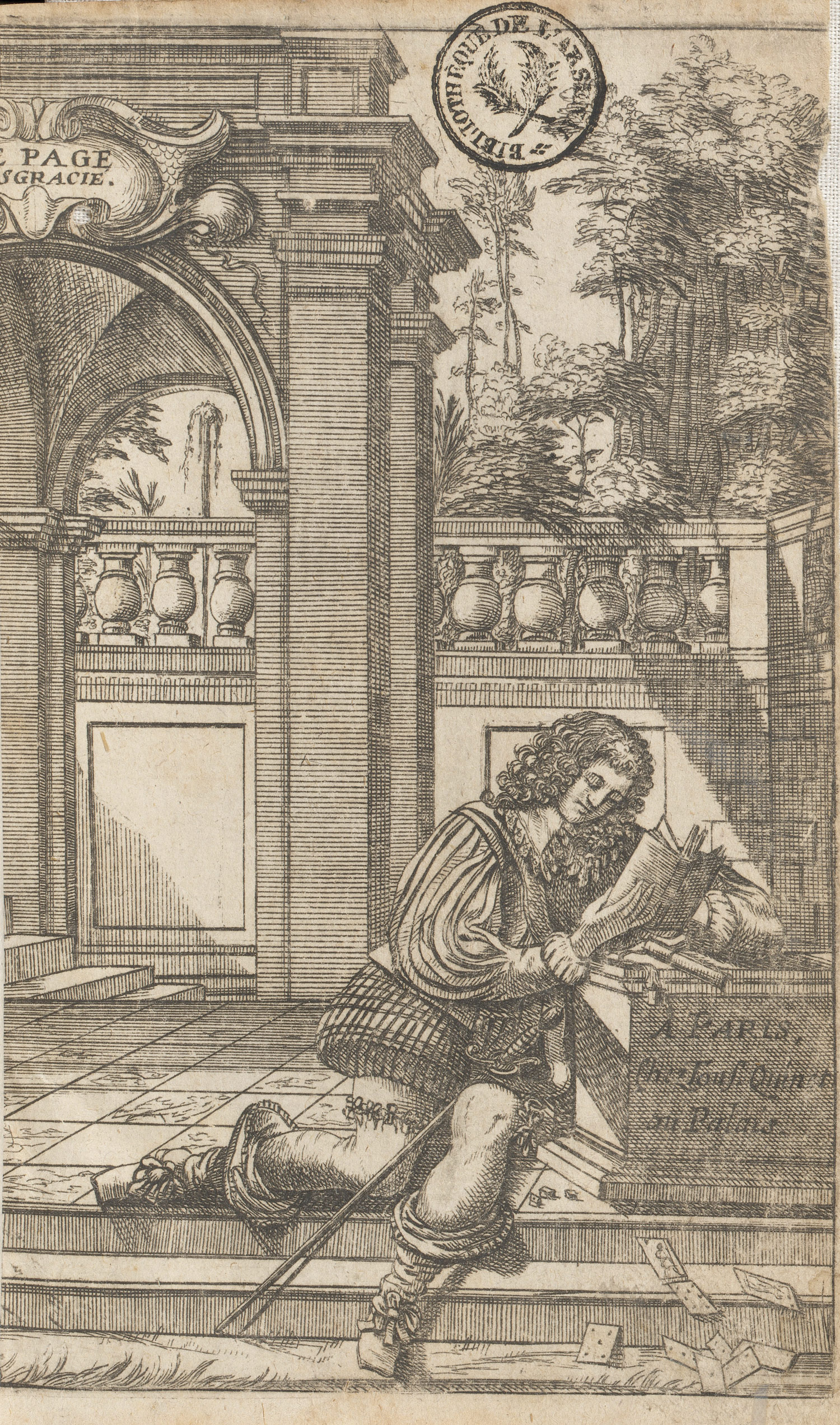 Frontispice de la première partie.